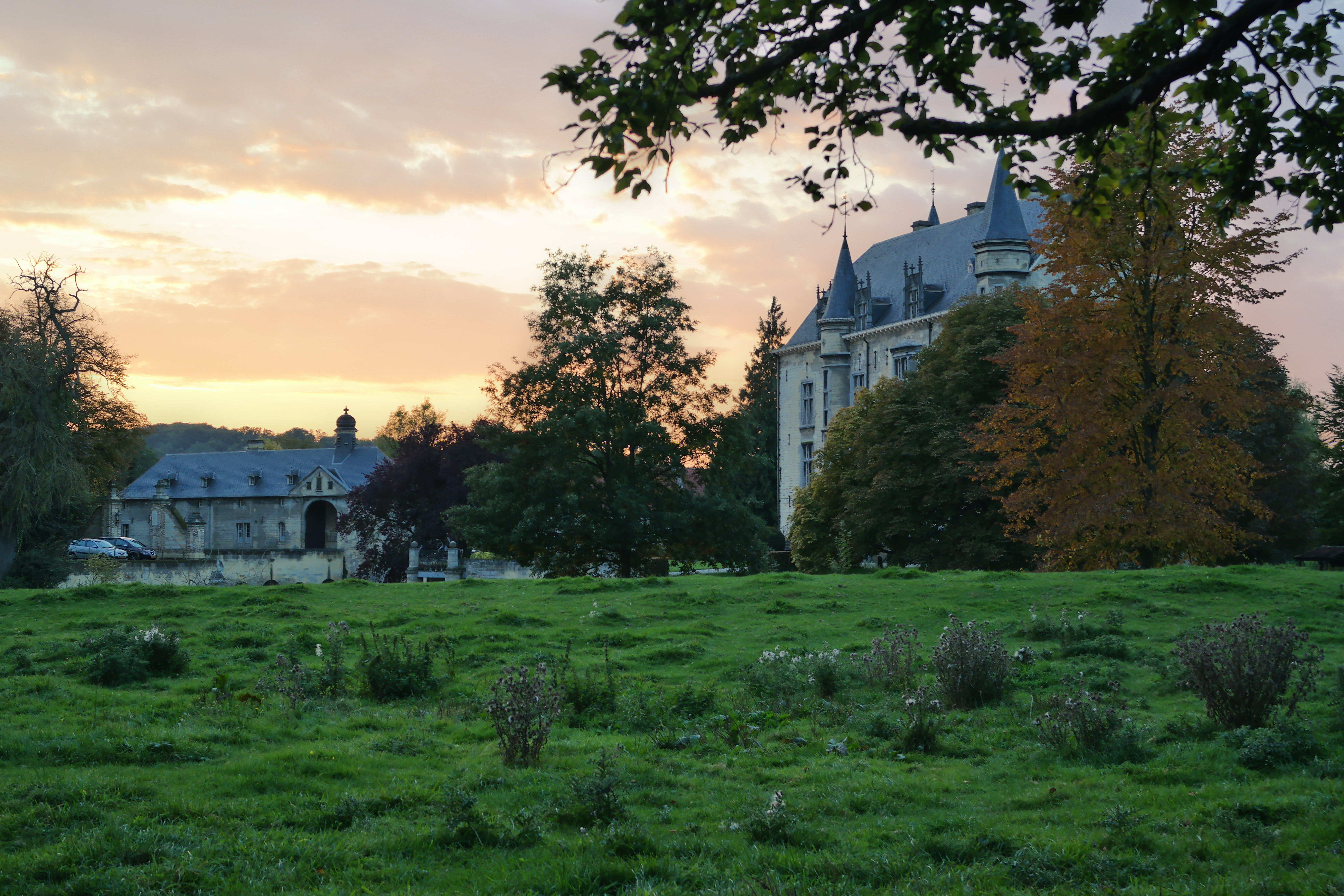 Kasteel Schaloen in Valkenburg.